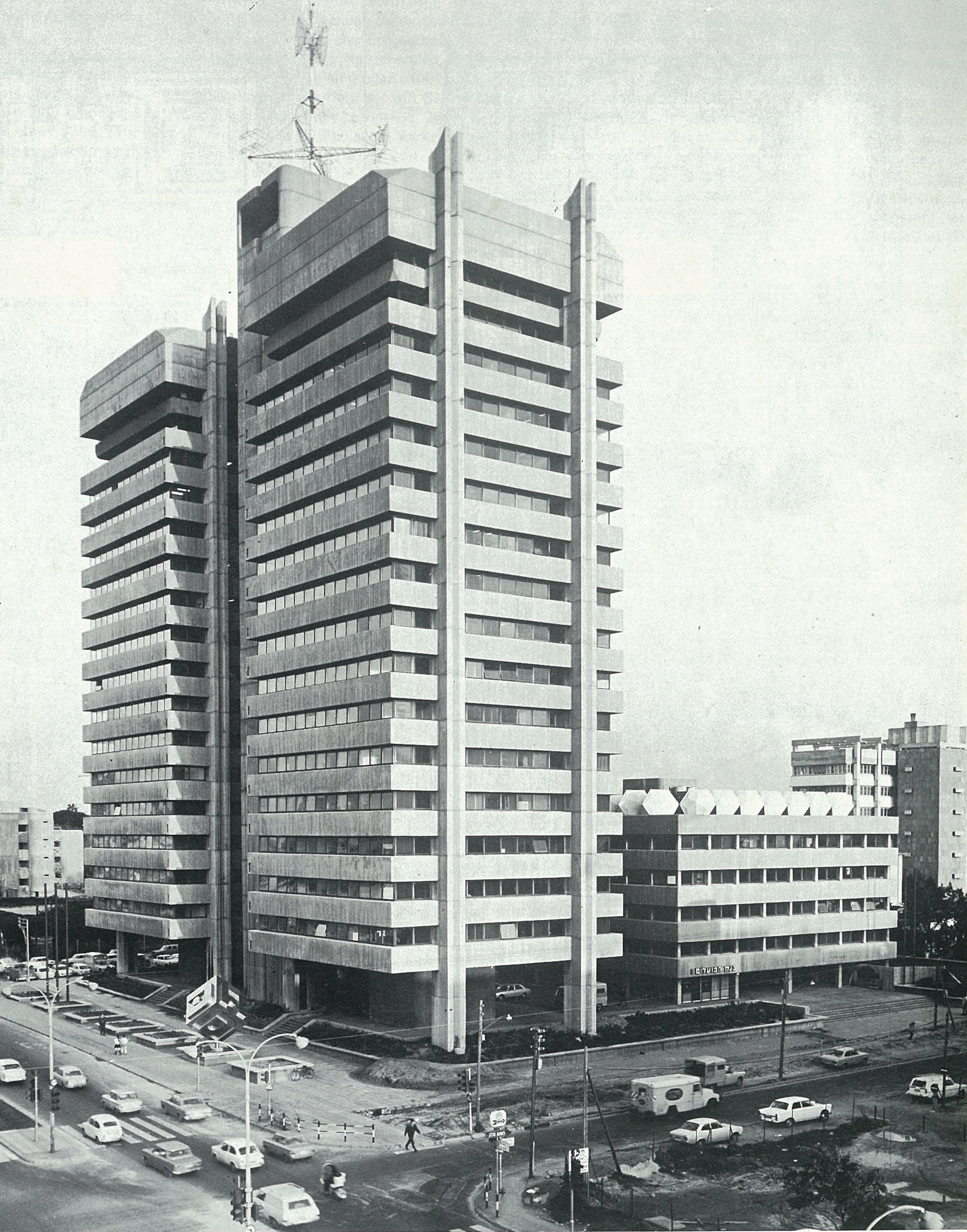 agricultural center / Amot